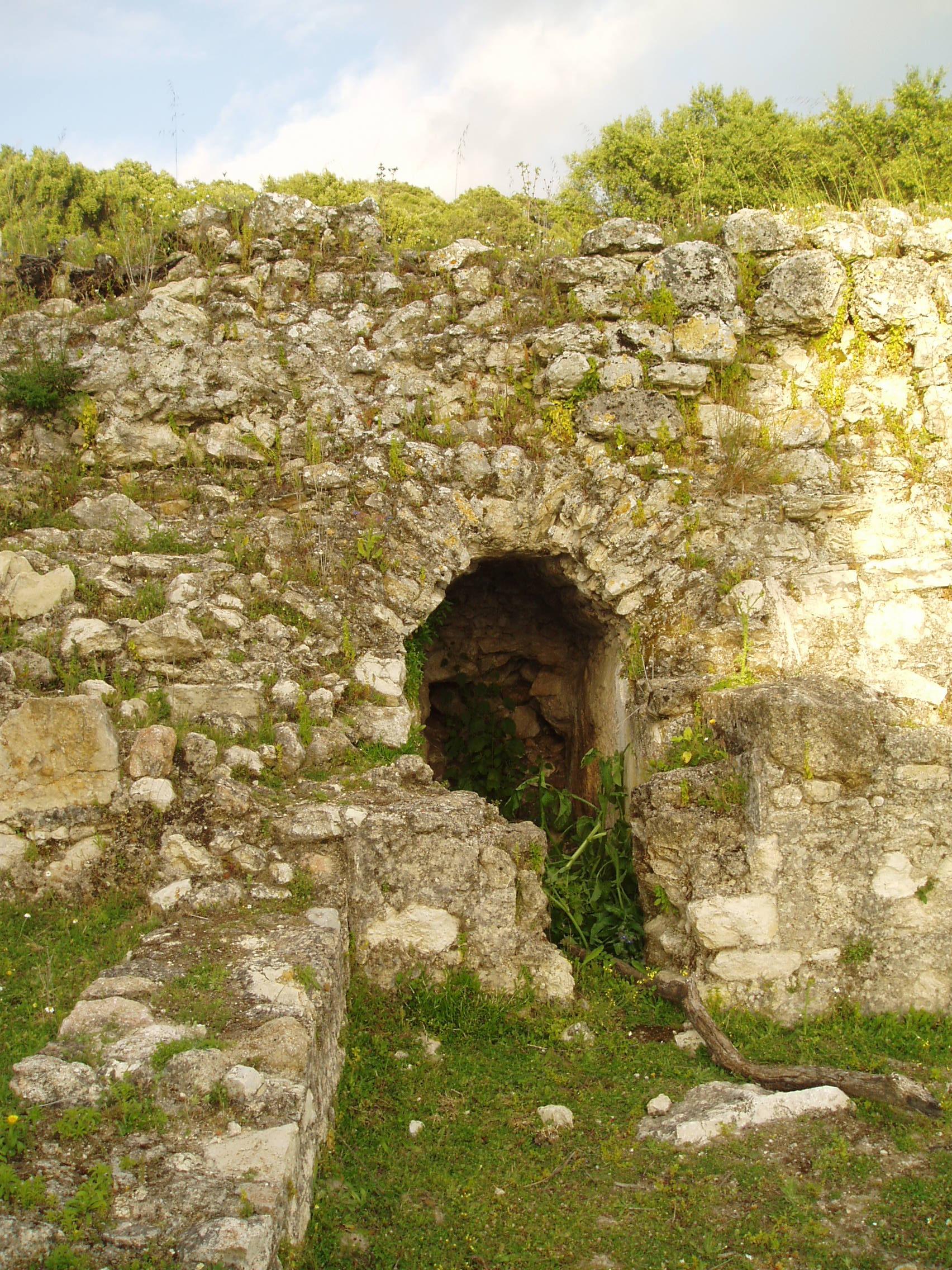 Calduba, en Arcos de la Frontera (Andalucía, España).